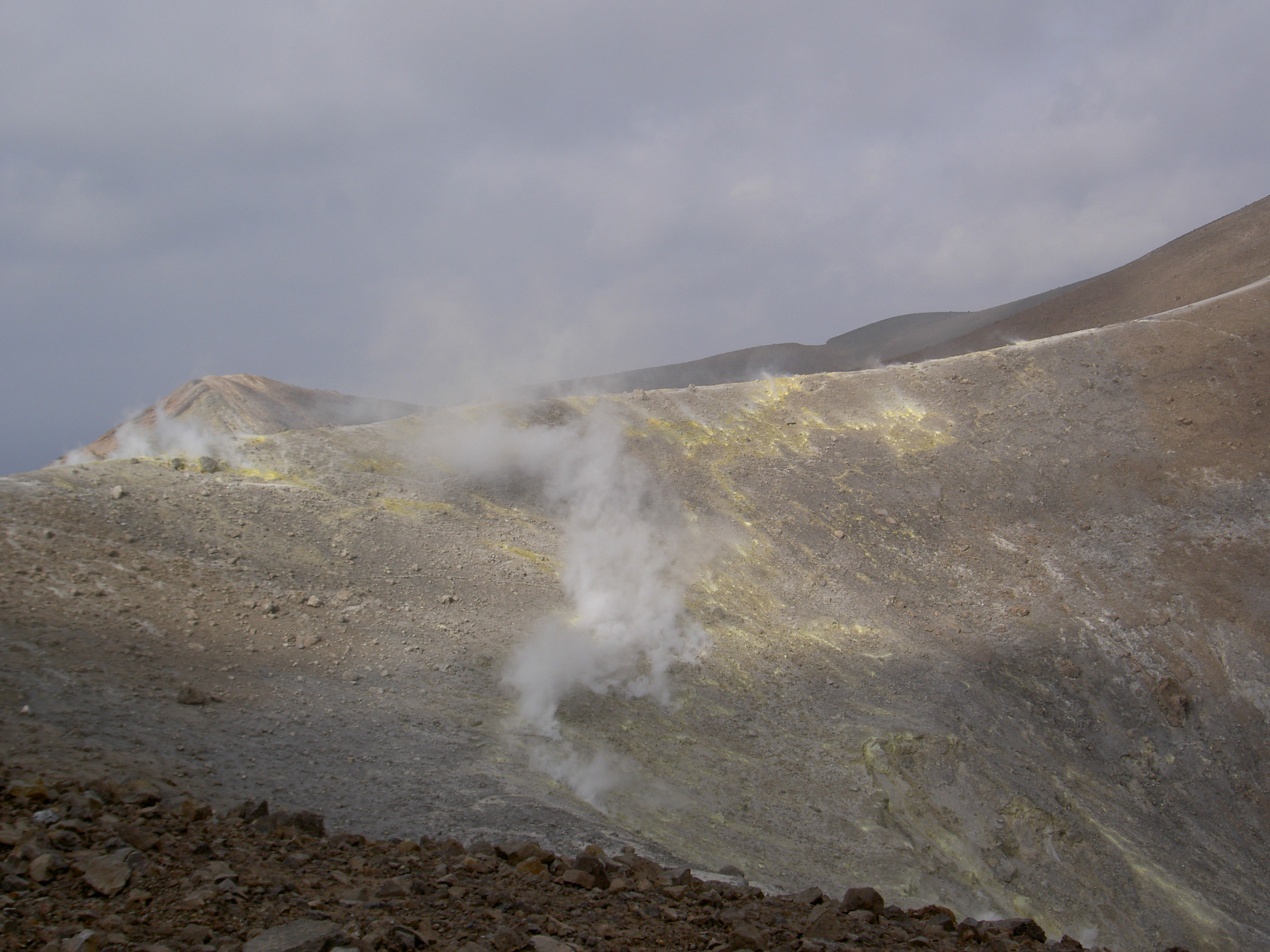 Vulcano, Sicily